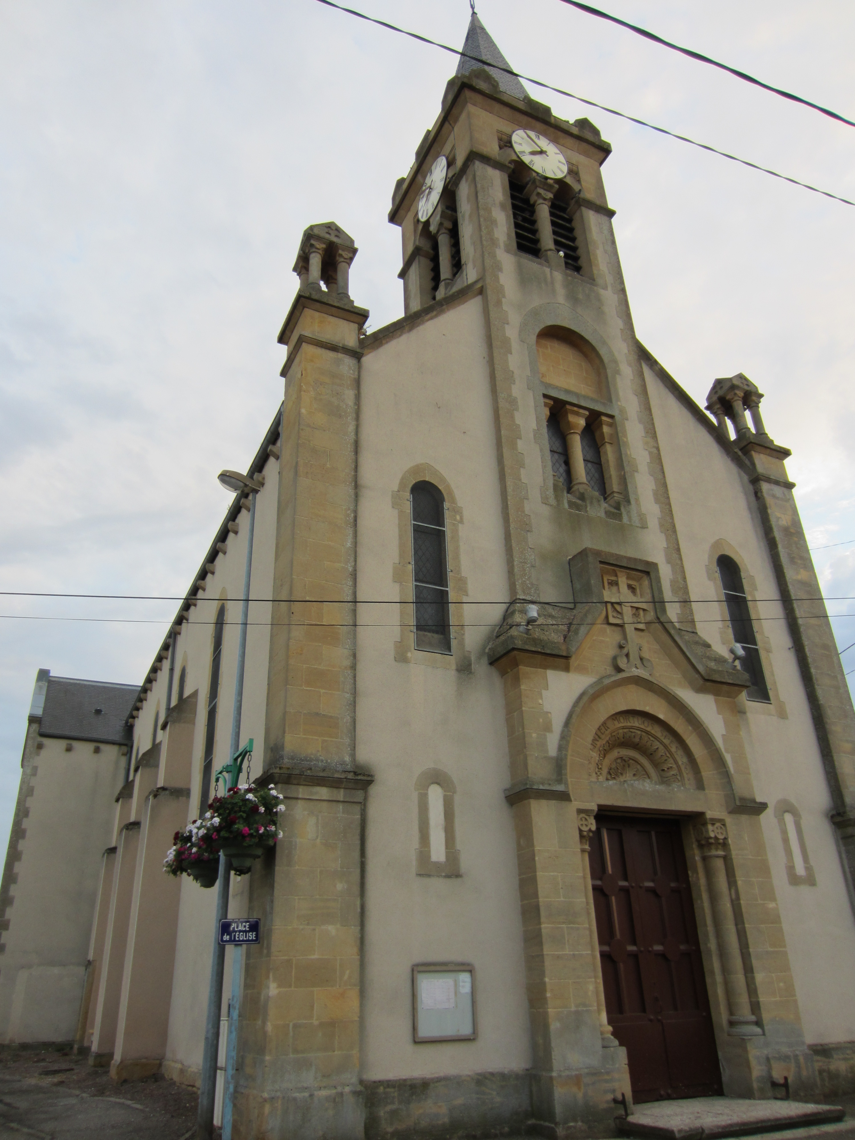 Description Église paroissiale Saint-Pierre Saint Paul Batilly Église paroissiale Saint-Pierre Saint Paul Batilly